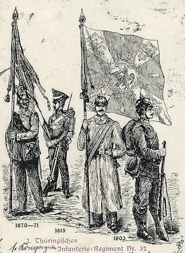 Soldaten des 2. Thüringische Infanterie-Regiments Nr. 32